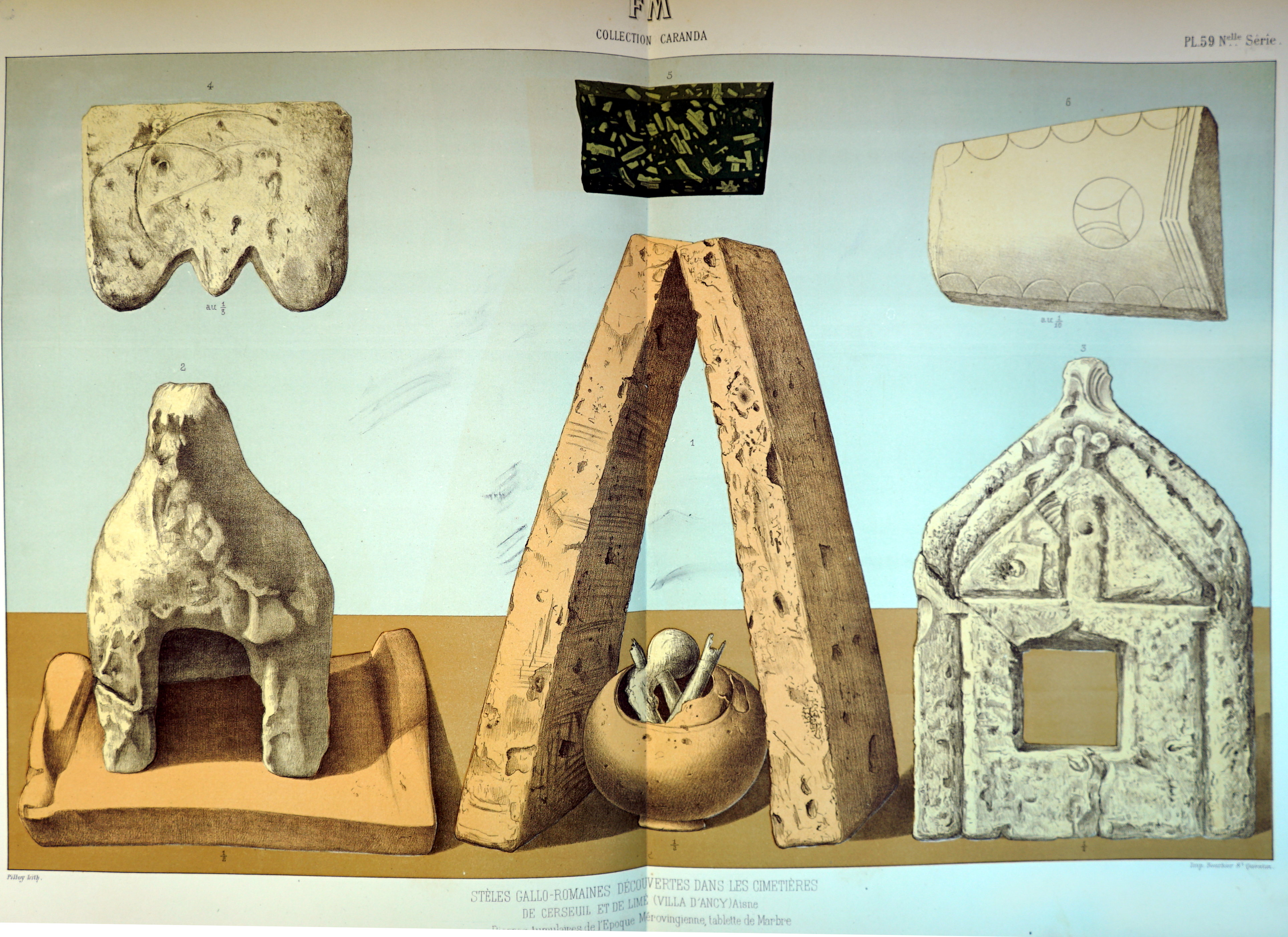 publication des fouilles de Moreau.